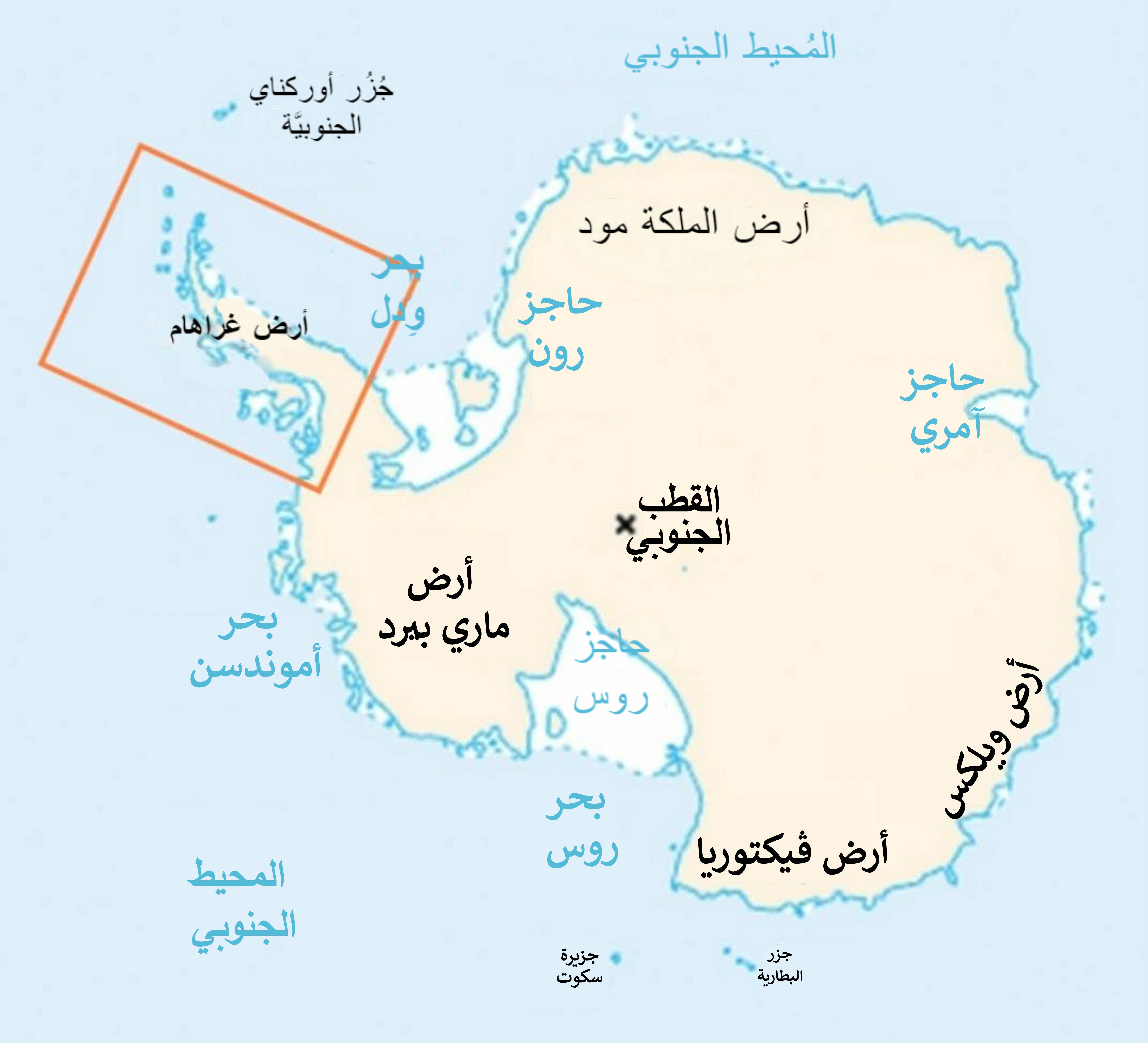 خريطة القارَّة القُطبيَّة الجنوبيَّة تُظهر موقع القسم الذي يُشكِّلُ شبه جزيرةٍ منها.